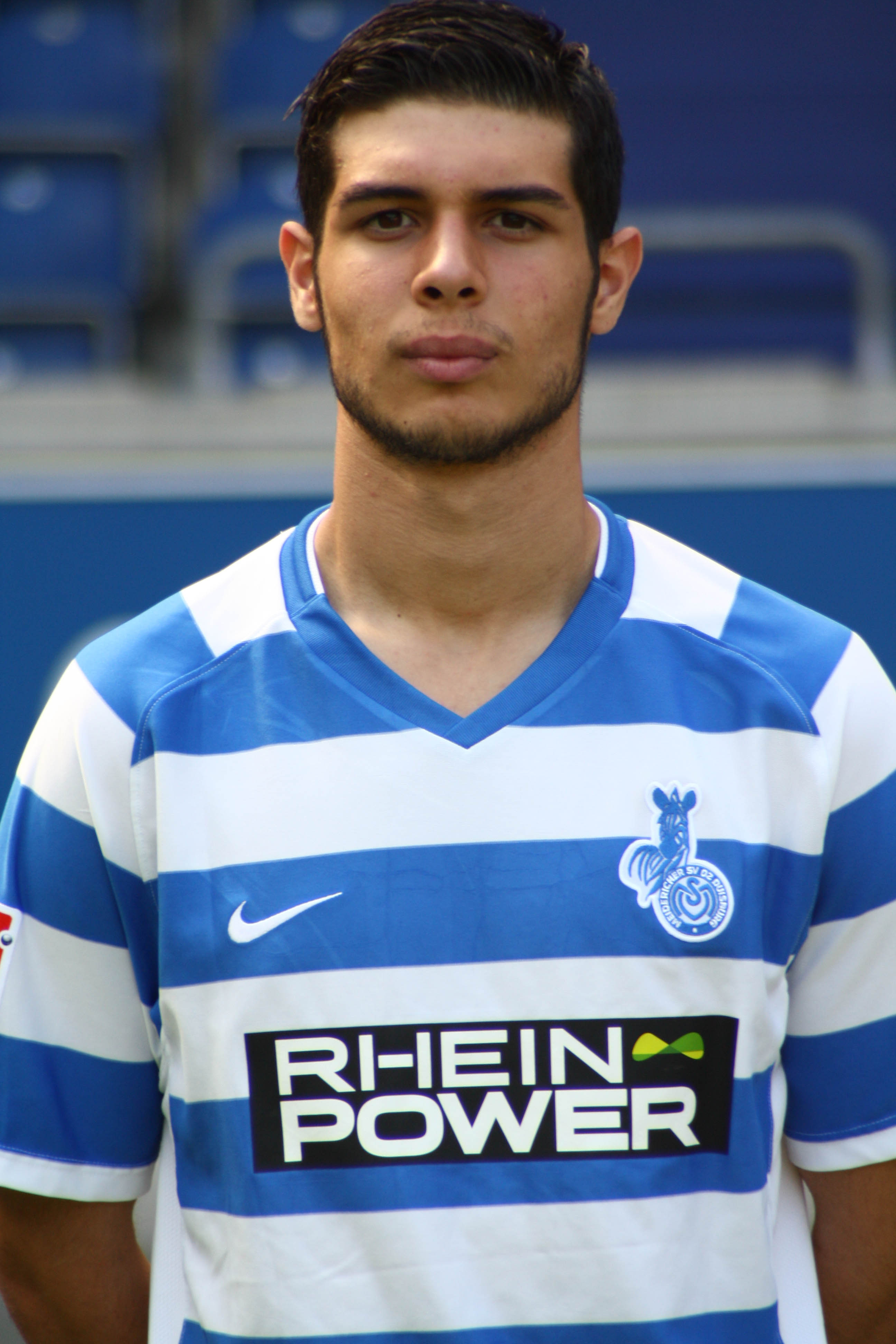 Burakcan Kunt, MSV Duisburg